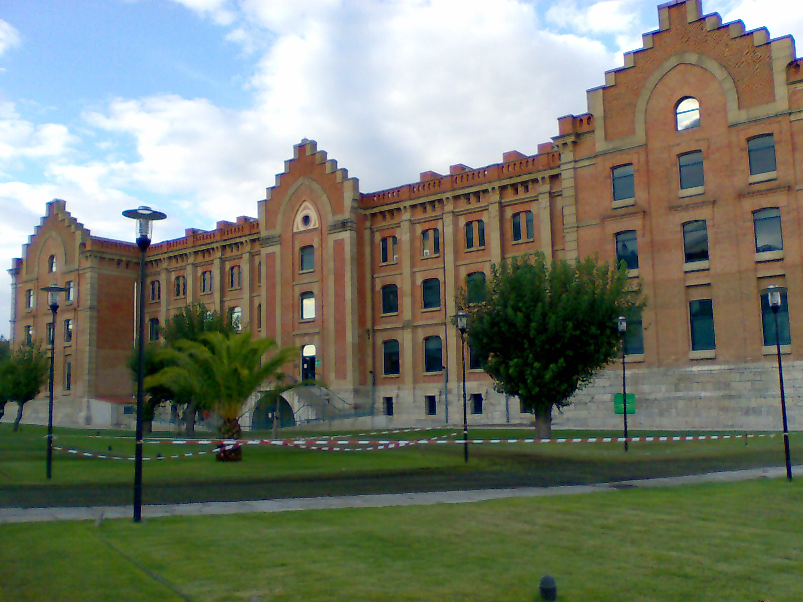 Antiguo cuartel militar, hoy reconvertido en campus universitario